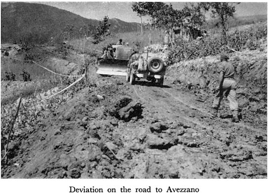 L'esercito neozelandese in Abruzzo nel 1944